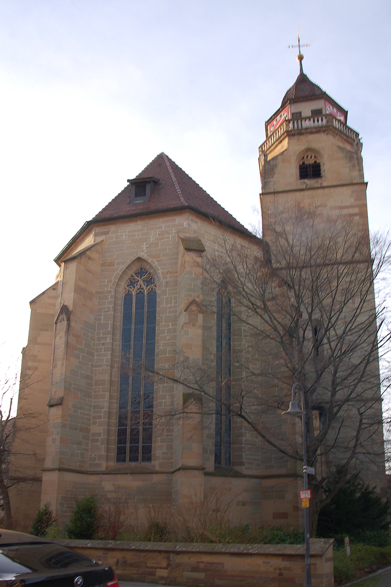 Chor und Turm der Stadtkirche Leonberg von Ostnordost